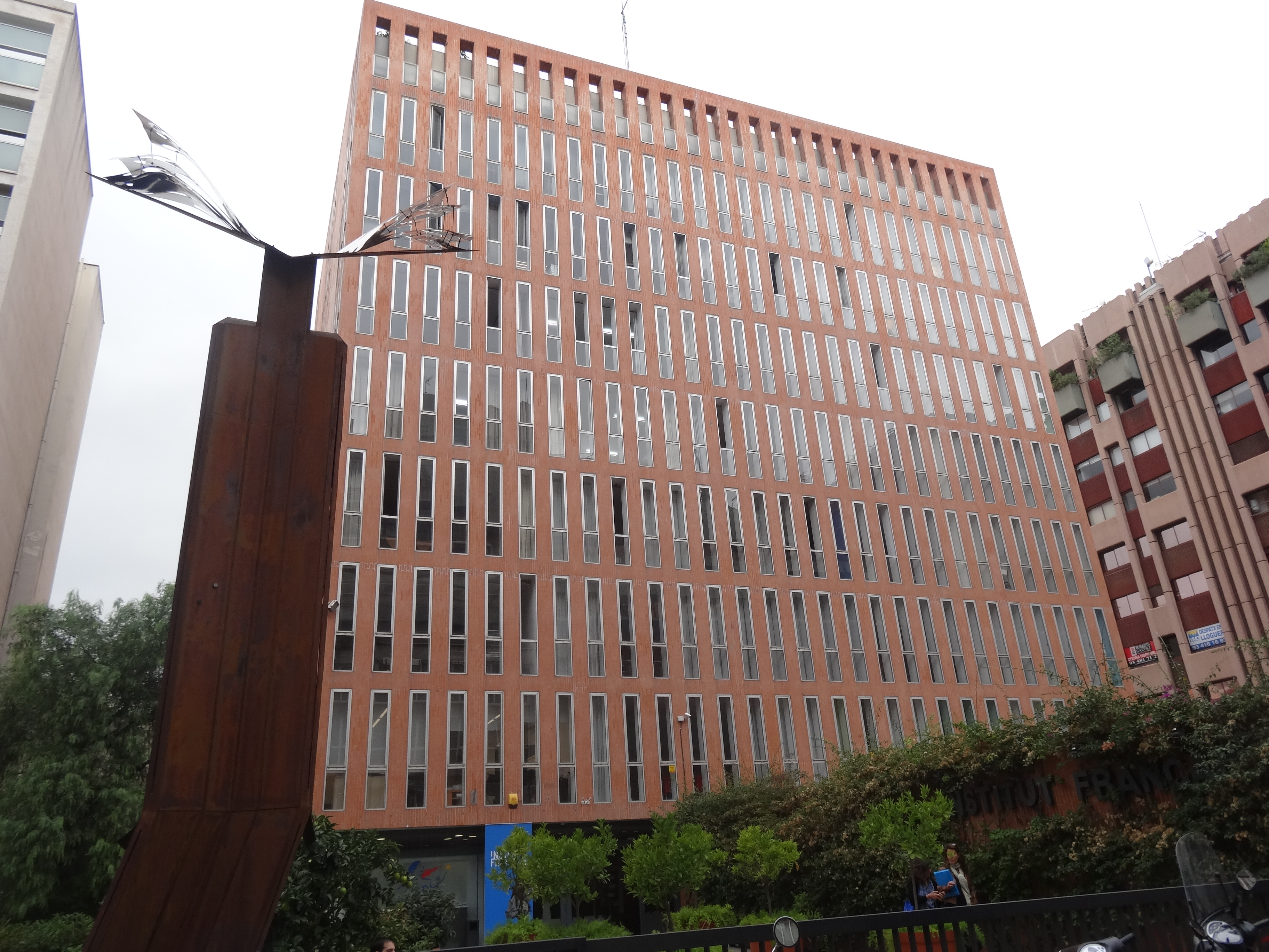 Institut Francès de Barcelona. Entrada